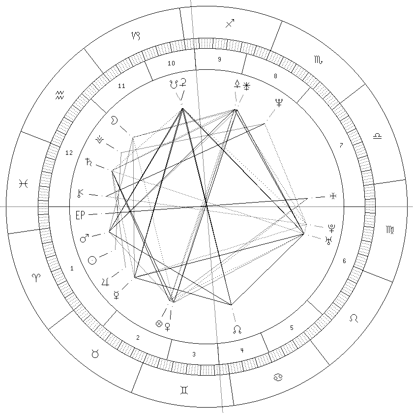 Horoscope, Astrology